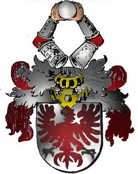 Wappen der Herren von Creutzburg